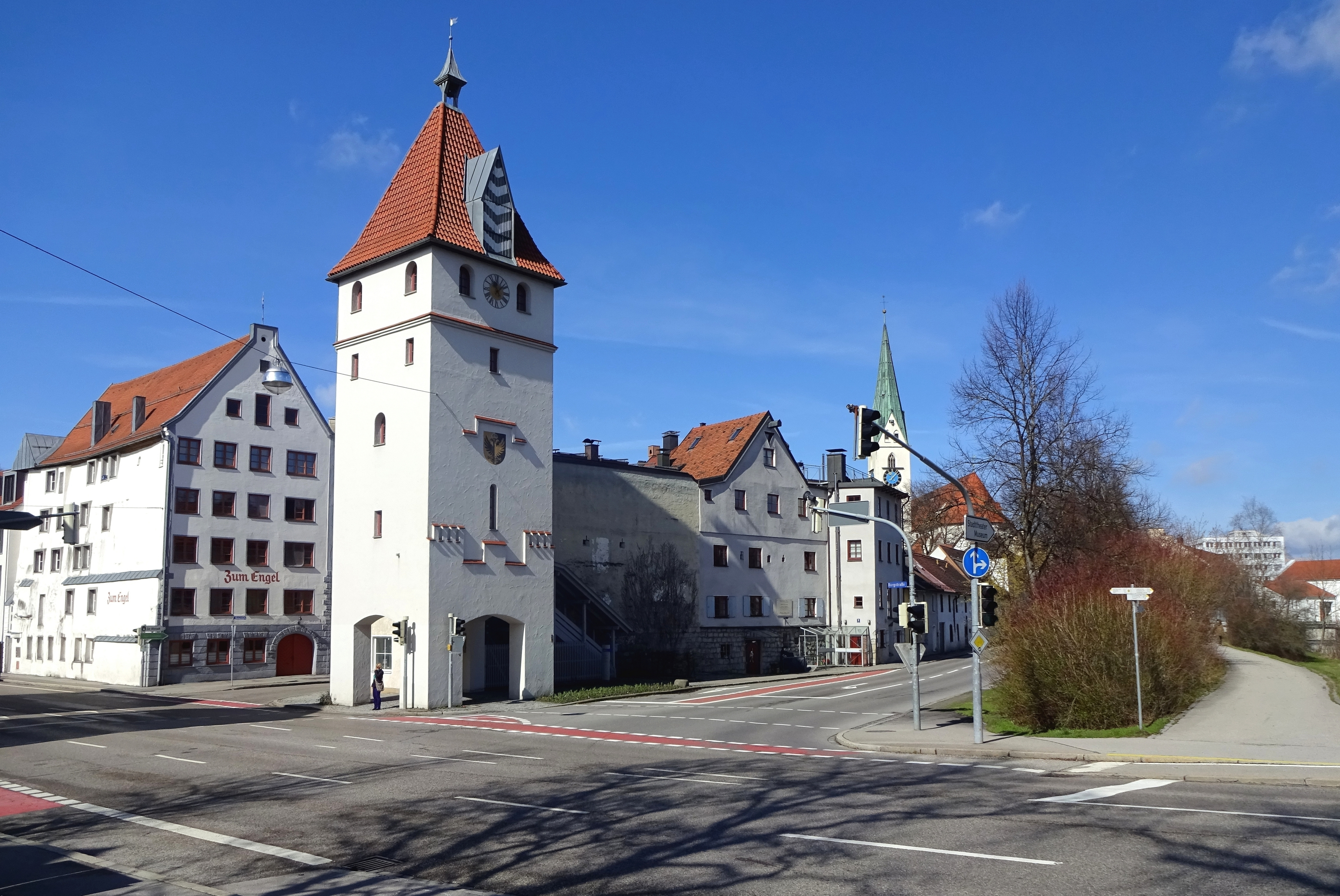 April 2015